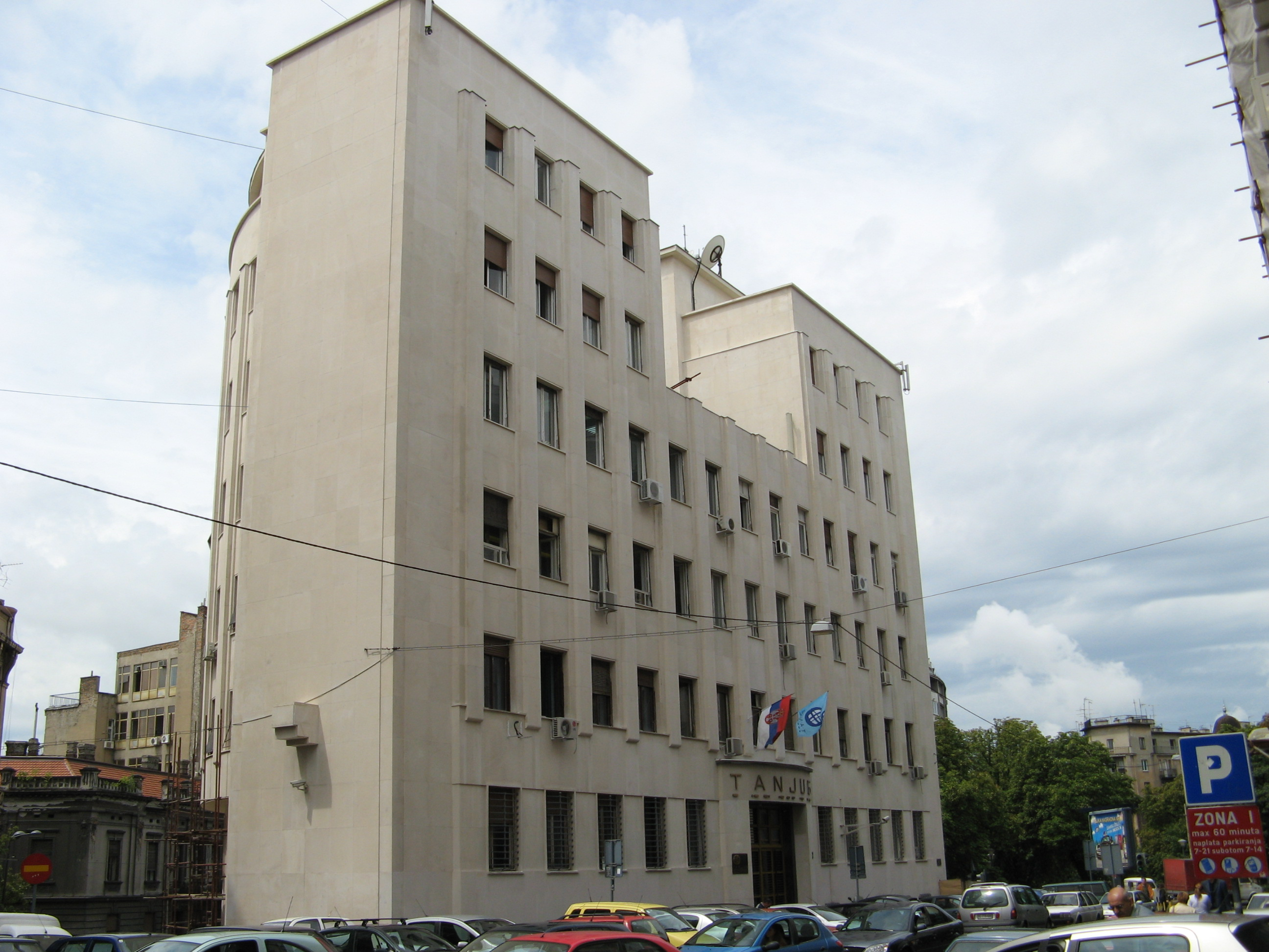 Зграда ПРИЗАД-а (ТАЊУГ)